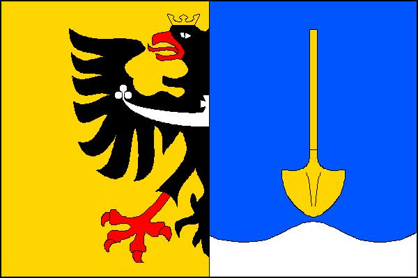 Vlajka obce Písek (okres Frýdek-Místek)